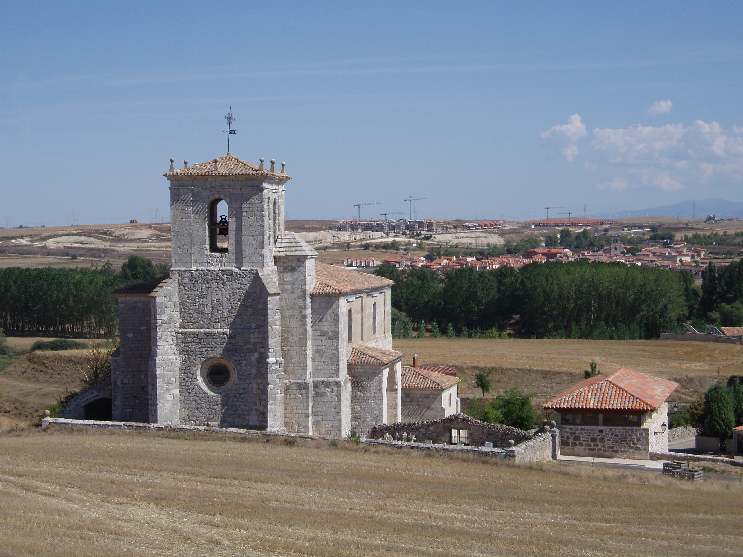 iglesia san miguel